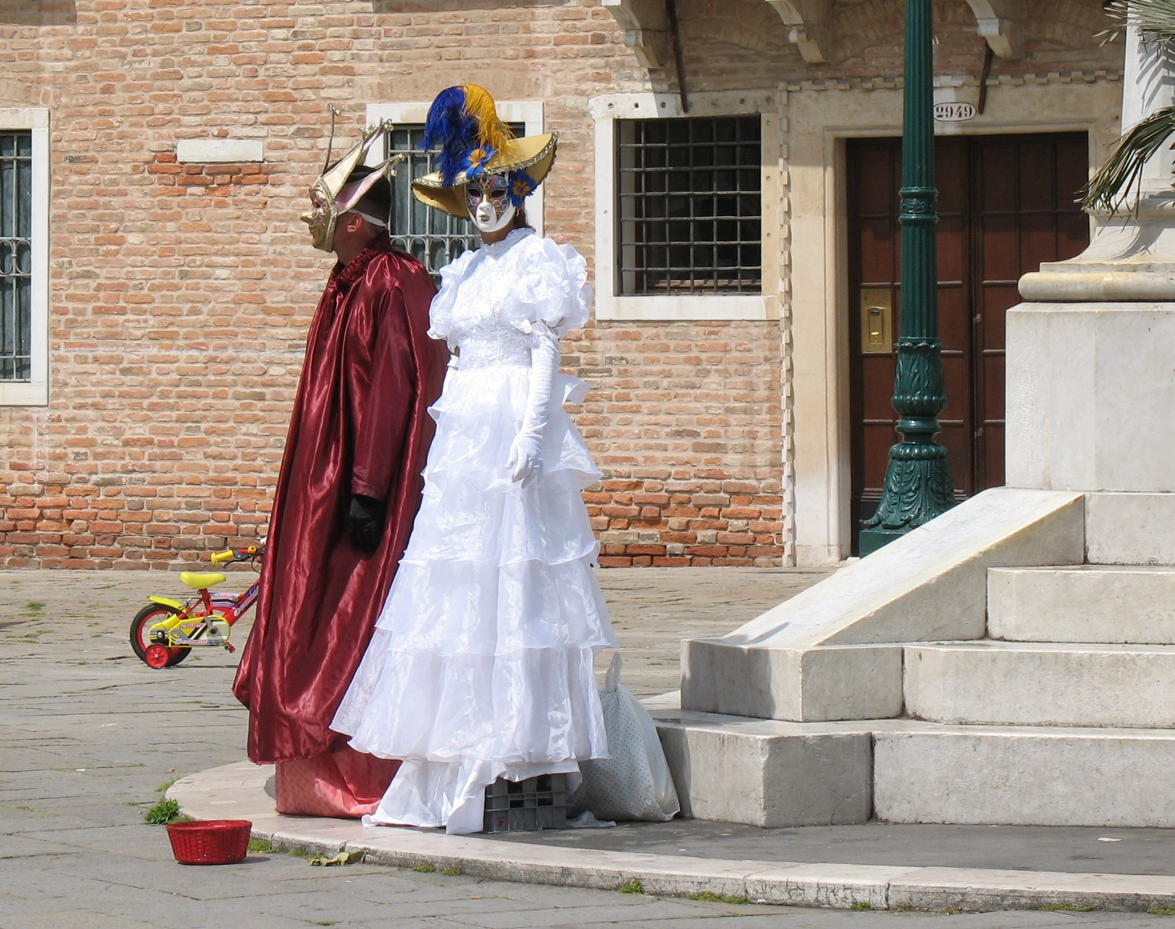 Living statues in a Campo of Venice (statue viventi a Venezia, Italia)